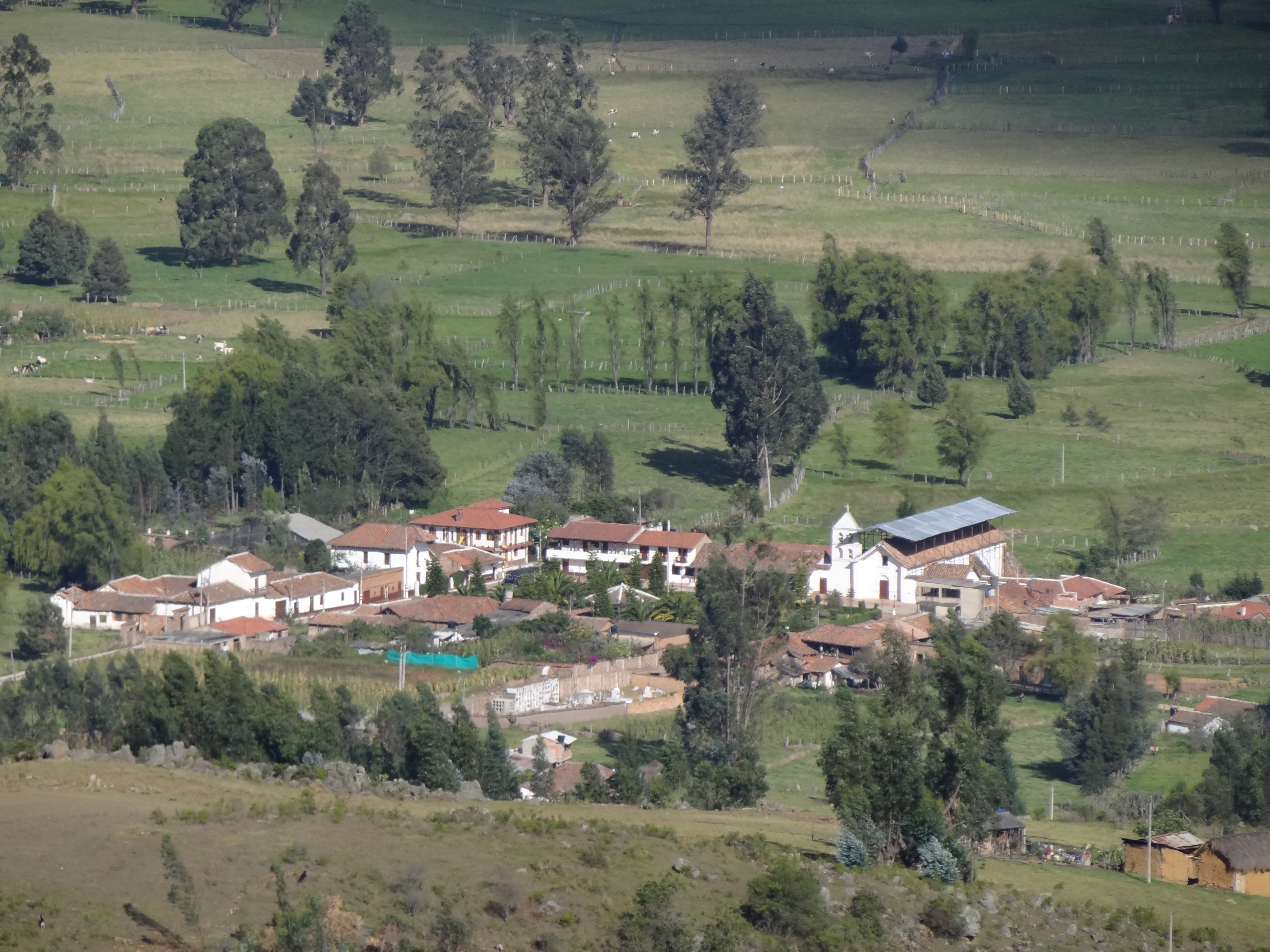 Caserío de Tobasía en el municipio de Floresta, departamento de Boyacá, Colombia